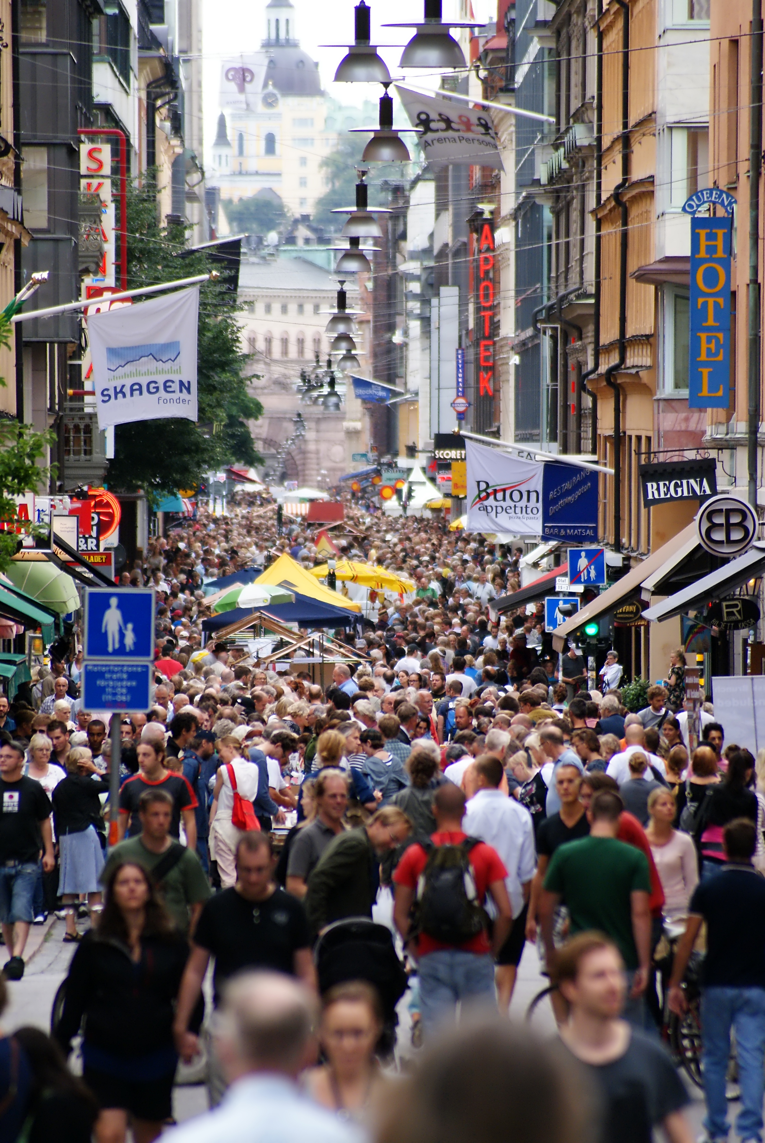 Världens längsta bokbord på Stokholms Kulturfestival 2010